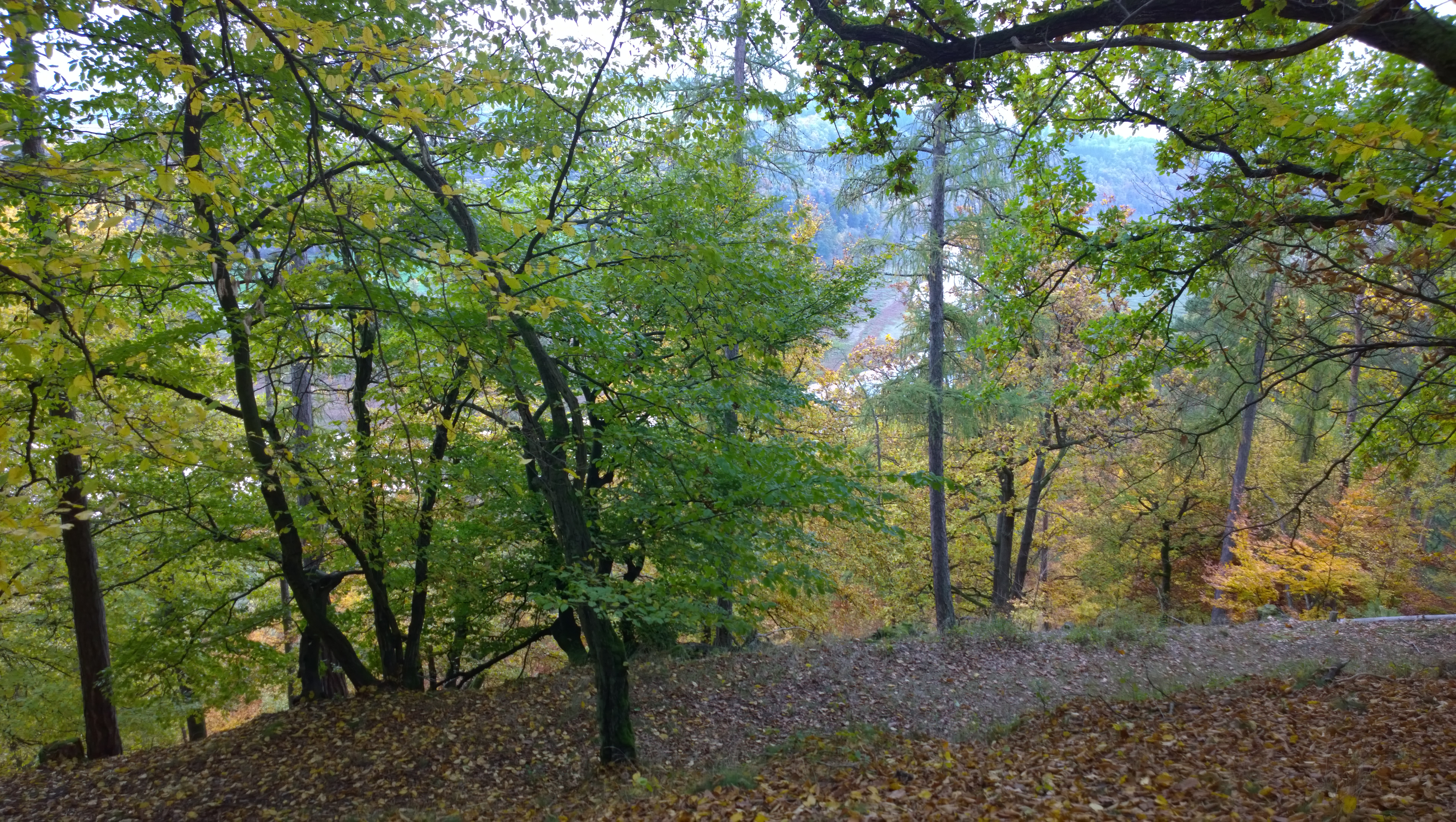 Blick ins Edertal Ri. Herzhausen